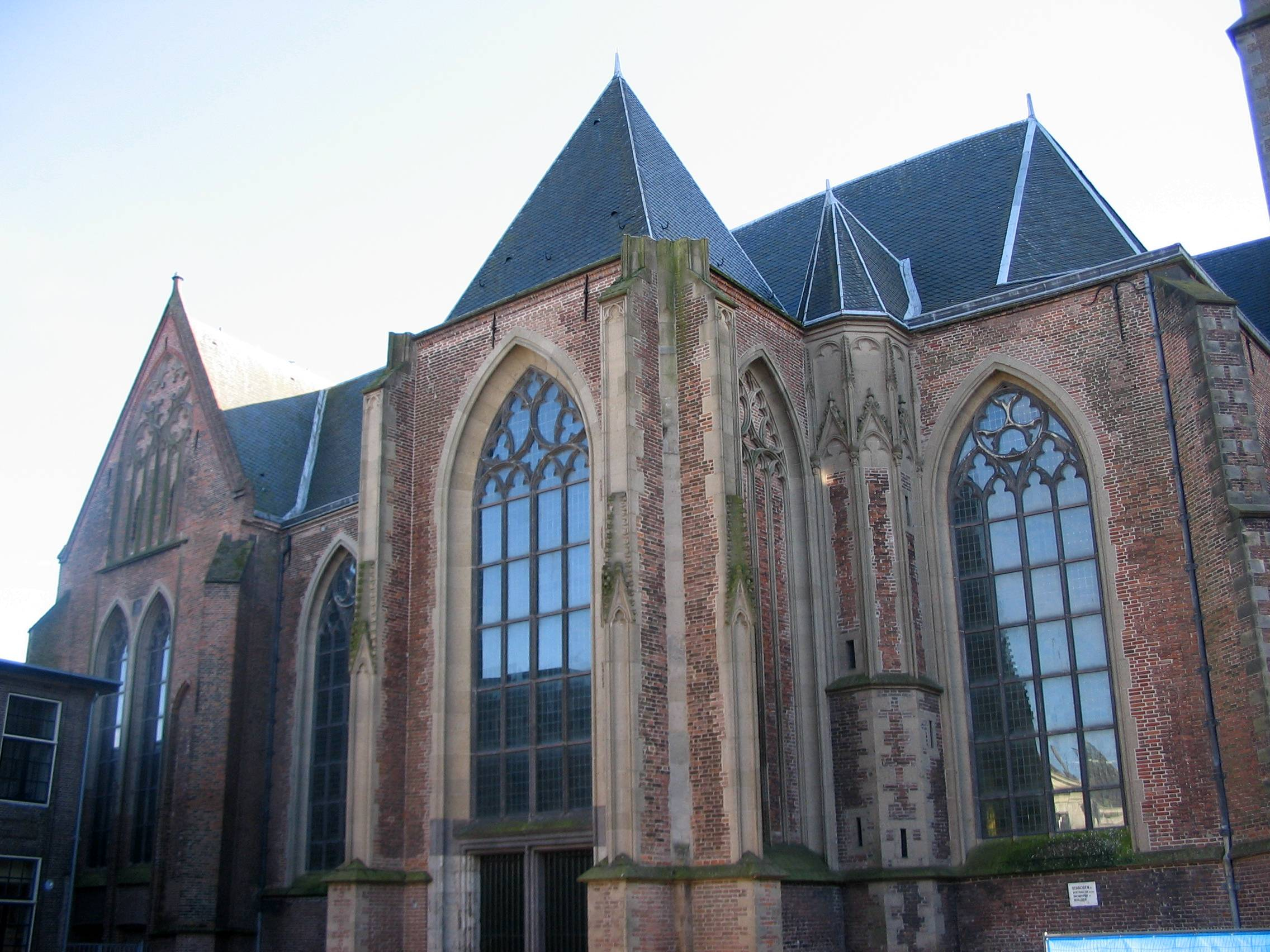 Kampen - Onze Lieve Vrouwe Kerk (Buitenkerk). Overwelfde hallenkerk met drie vijfzijdig gesloten absiden en transept